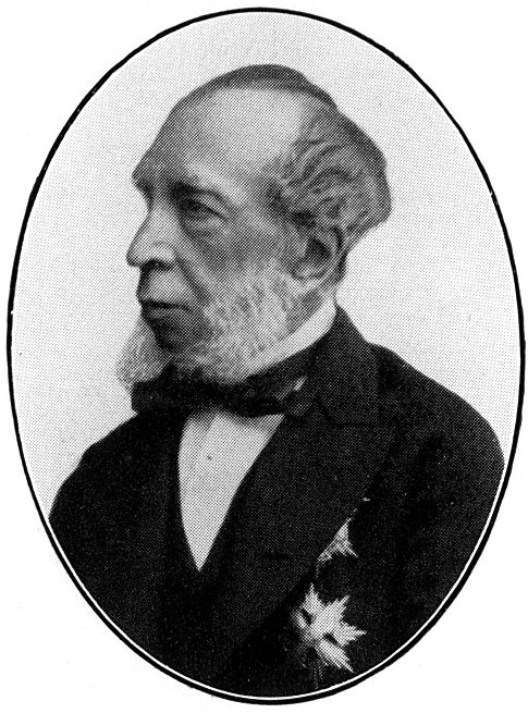 Portrait